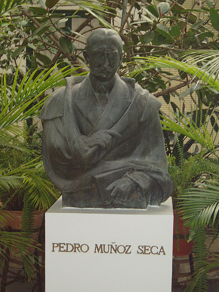 Busto de Pedro Muñoz Seca en El Puerto de Santa María